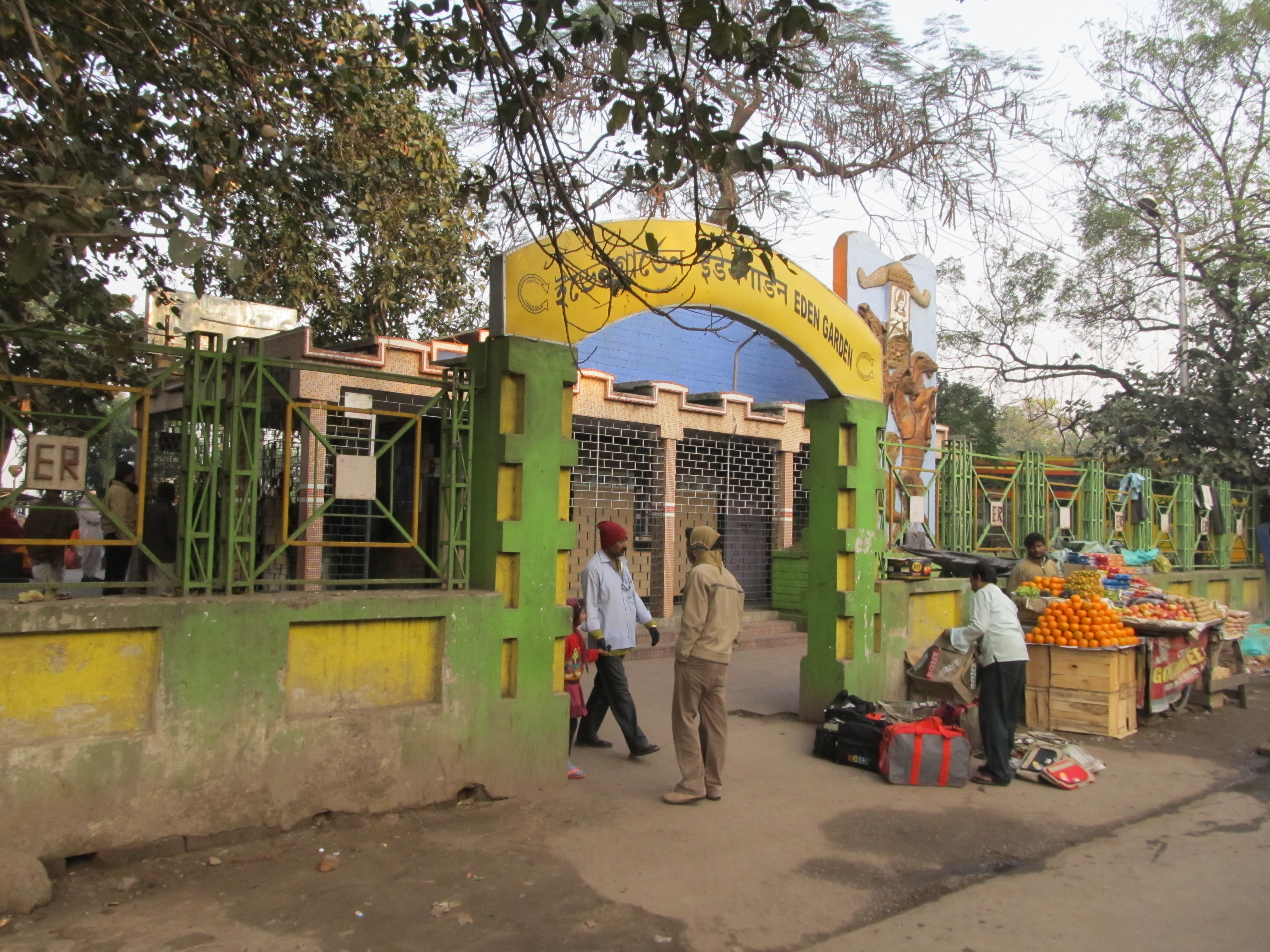 Photographed at Kolkata.